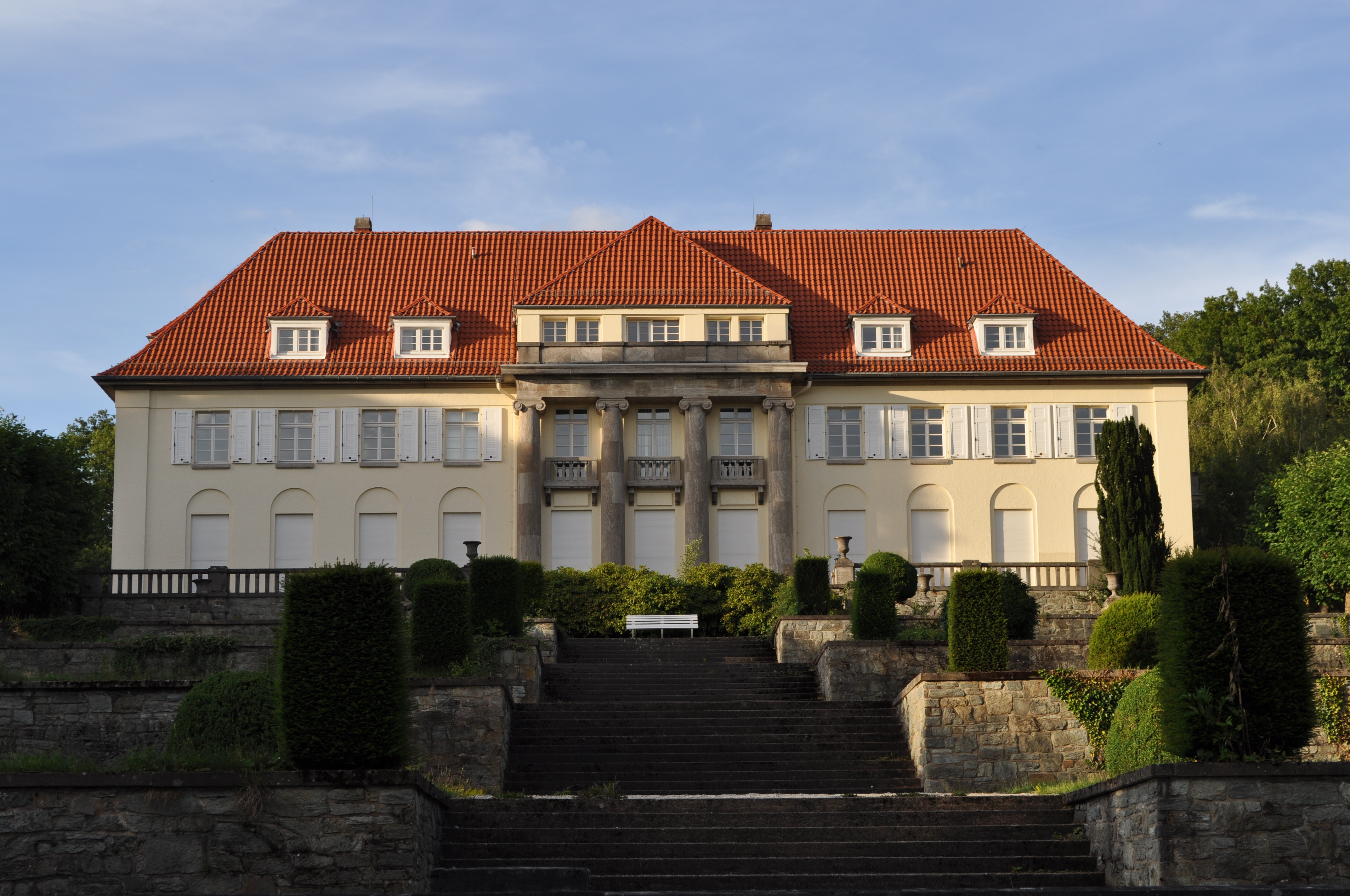 Villa Adolf Gans in Königstein, Gründer der Cassella & Co., Architekt Bruno Paul, Berlin, jetzt ein Dienstsitz der Deutschen Rentenversicherung Hessen